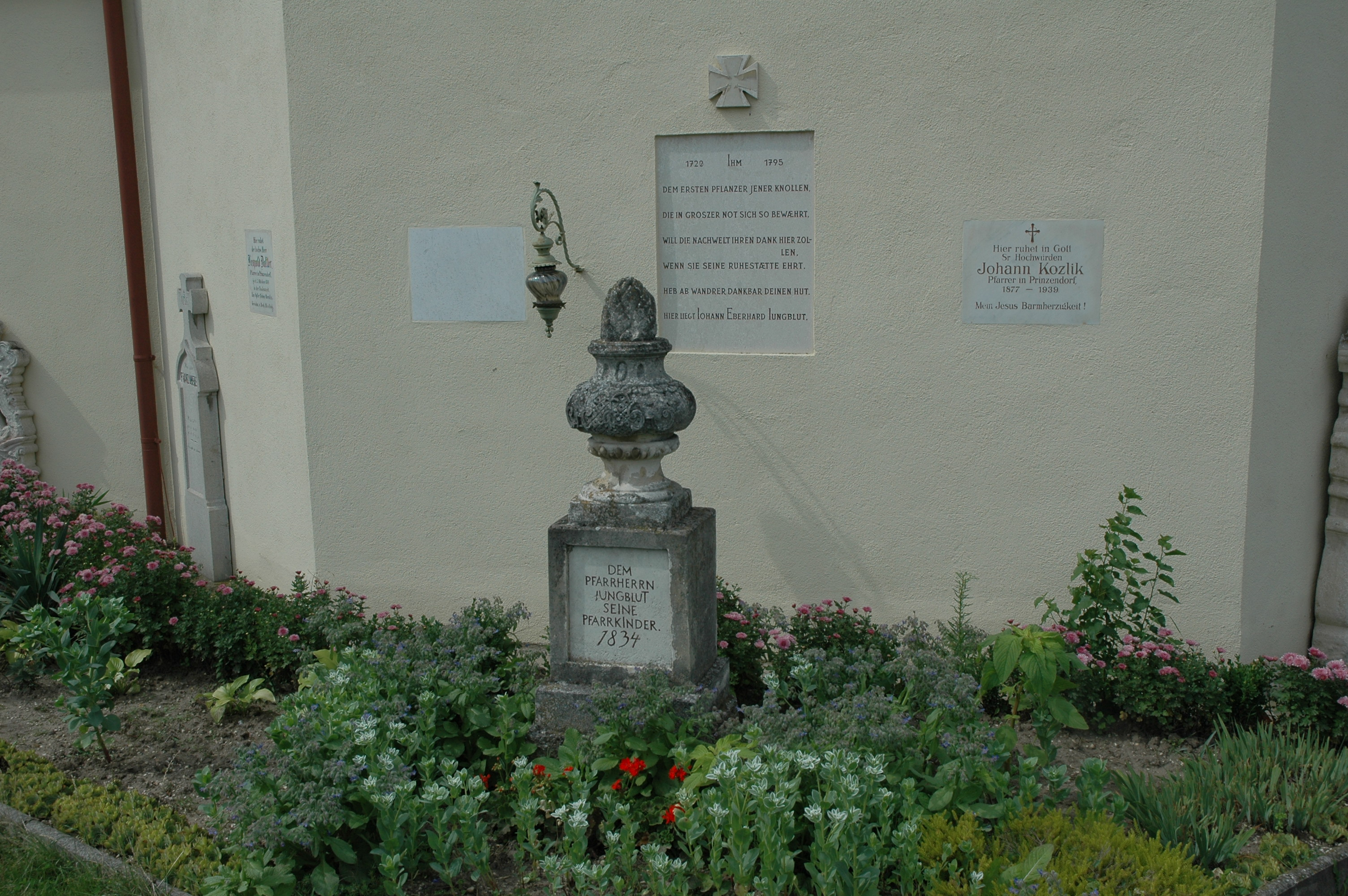 Denkmal für den Pfarrer Johann Eberhard Jungblut in Prinzendorf an der Zaya, Österreich